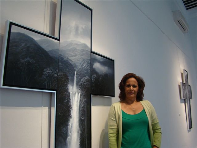 ATHD